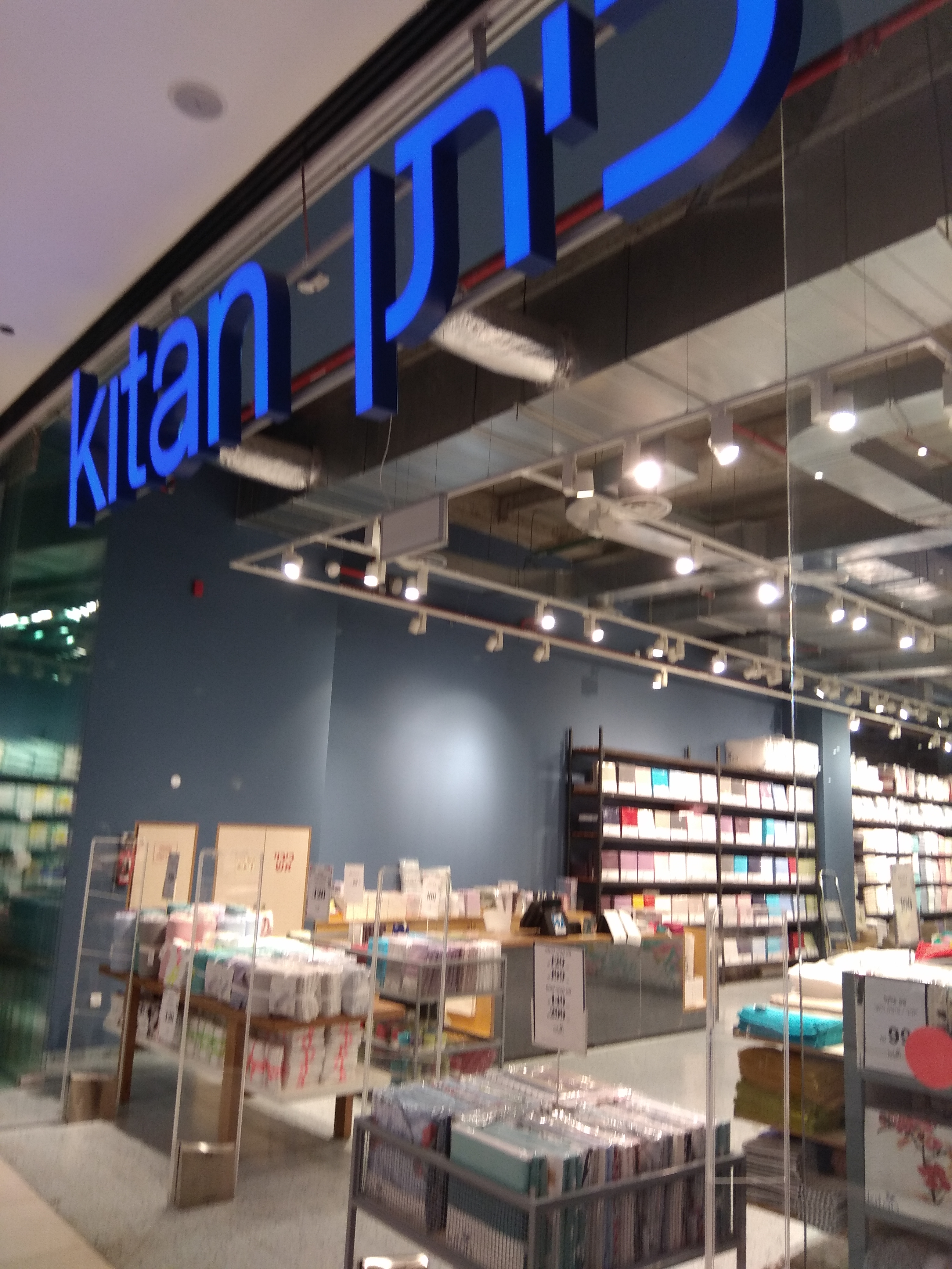 חנות של המותג כיתן